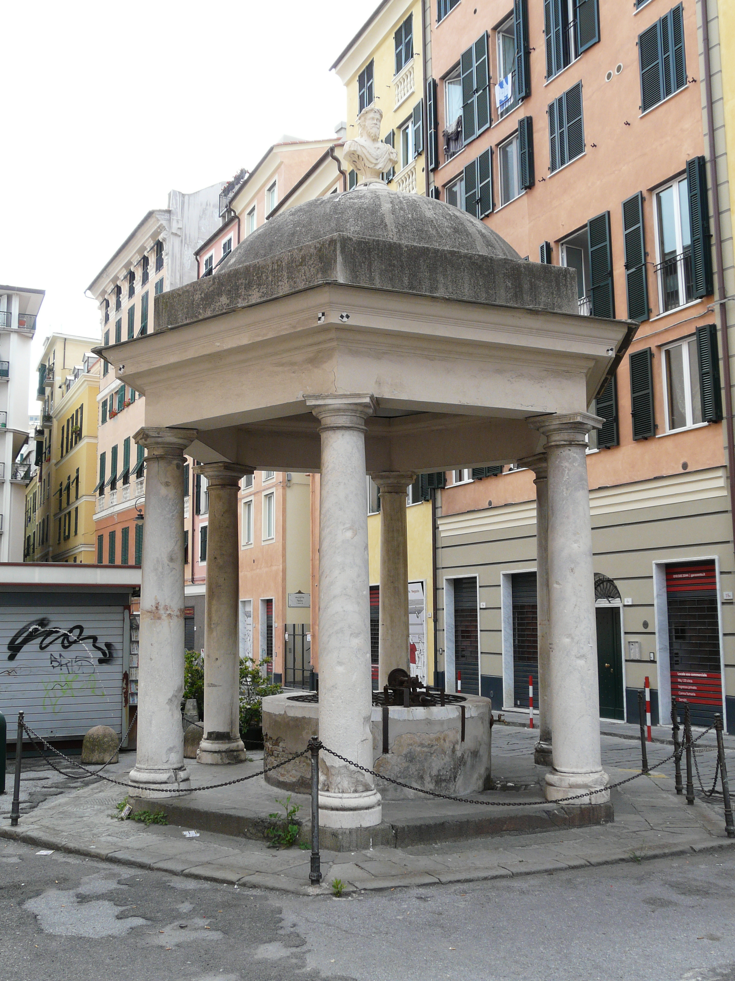 Pozzo presso piazza di Sarzano, Genova, Liguria, Italia